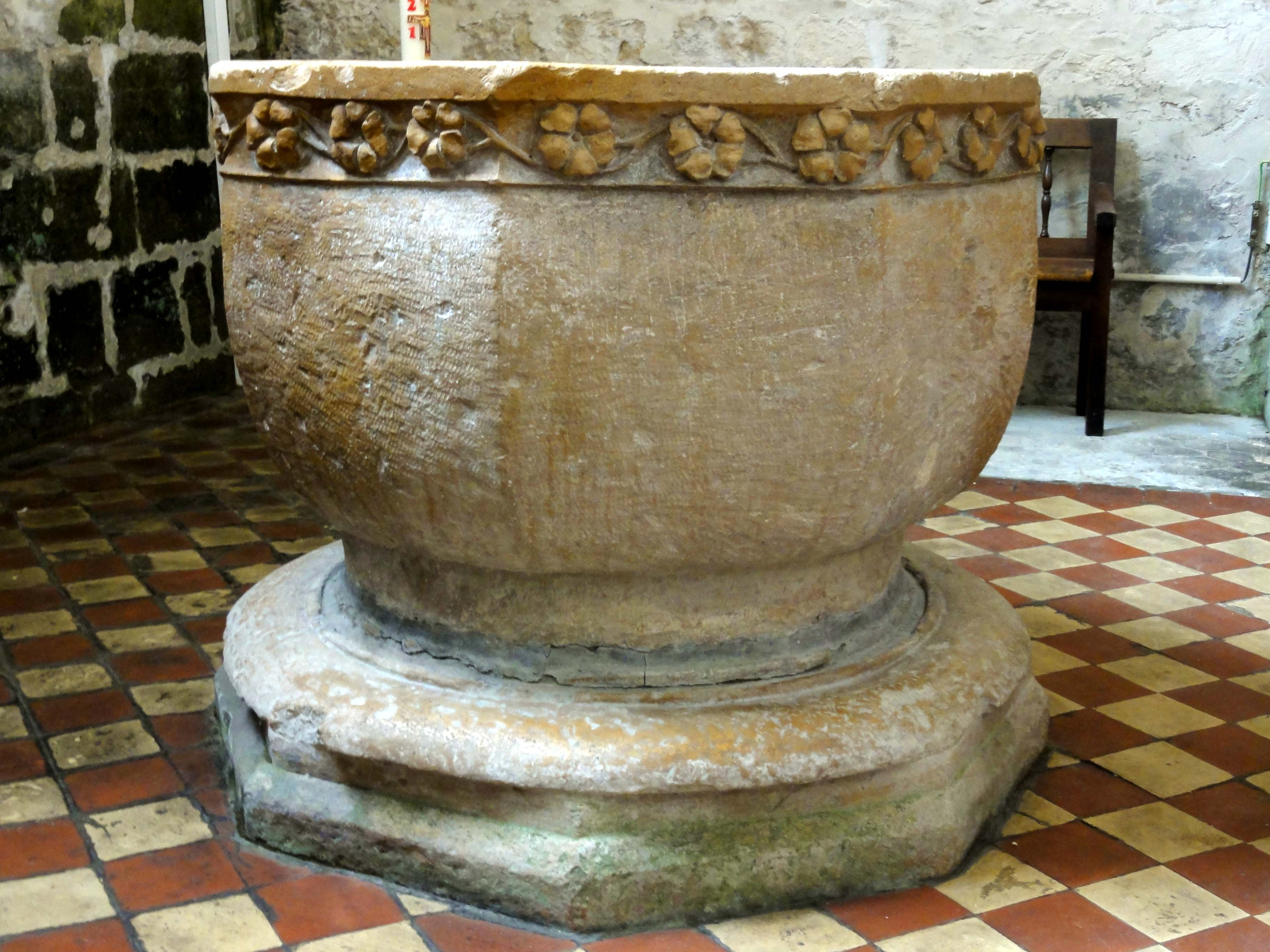 Fonts baptismaux du milieu du XIIIe siècle.